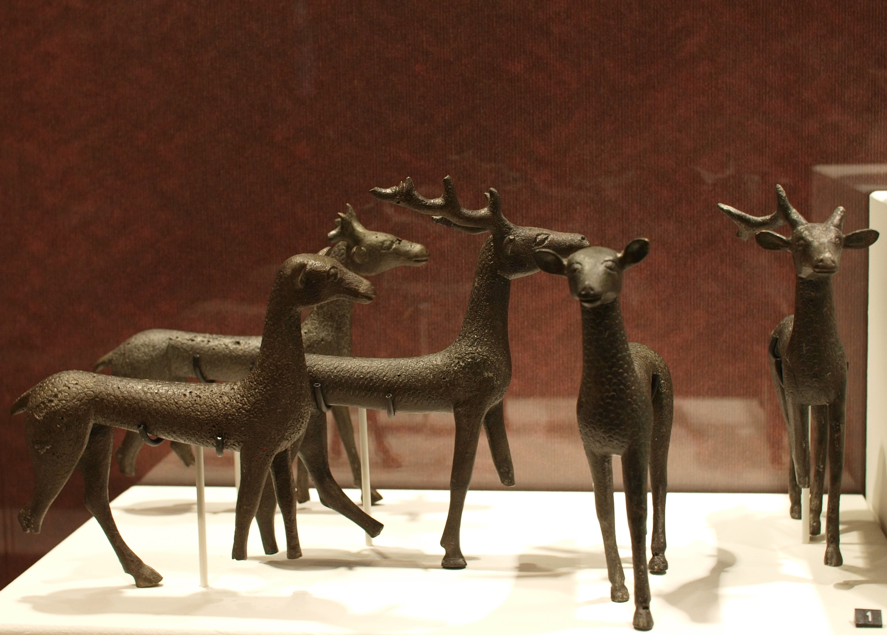 Bronzetti étrusques de cervidés trouvés à Brolio - Val di Chiana-Toscane (Etruscan jewellery in the Rijksmuseum van Oudheden, Leiden).